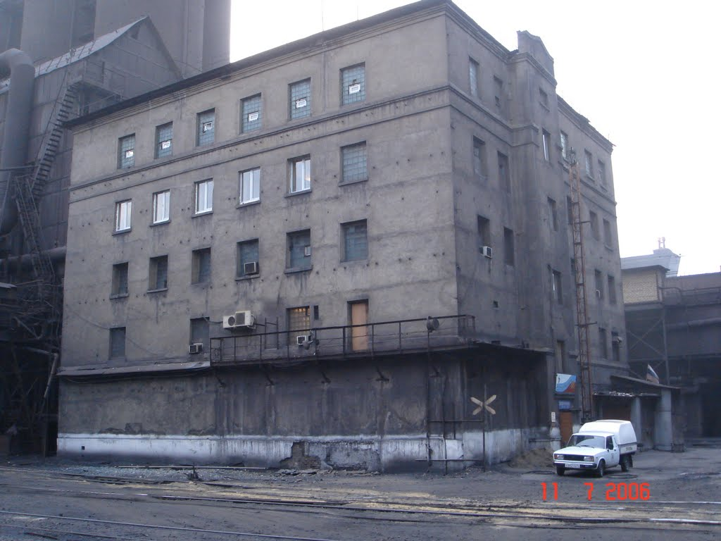 Контора доменного цеха Магнитогорского металлургического комбината по проекту архитектора Дукельского Алексея Марковича. В настоящее время рабочие ММК называют ей "старой диспетчерской"